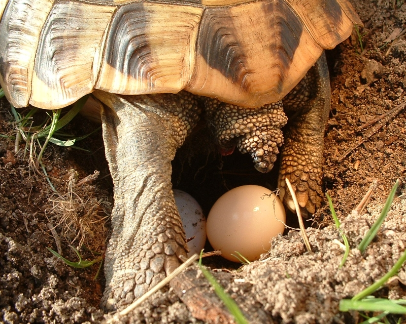 Junges Weibchen bei der zweiten Eiablage. Das Ei fällt gerade und hatte noch keinen Bodenkontakt. Man kann deshalb die schützende, feuchte Schleimschicht um die harte Kalkschale gut erkennen.